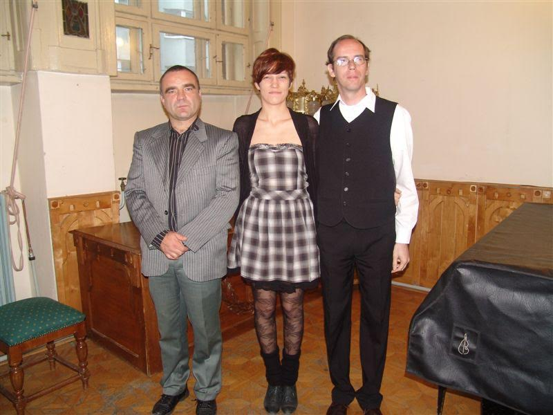 Én és a Ketten kedden zenekar